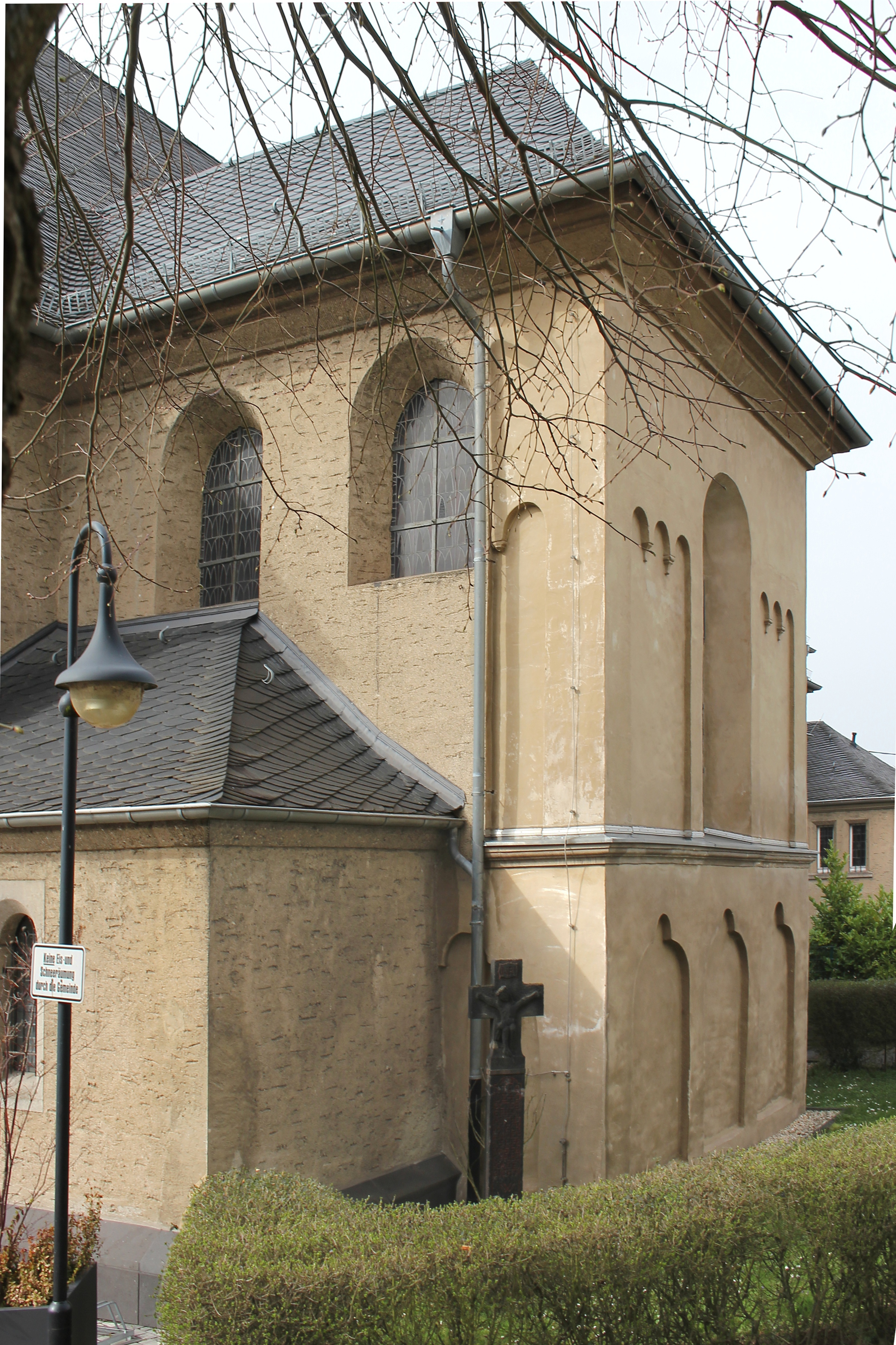 Romanischer Ostchor (Südostseite) der Pfarrkirche St. Mauritius Kärlich, Mülheim-Kärlich, Kirchstraße 17; erbaut um 1200